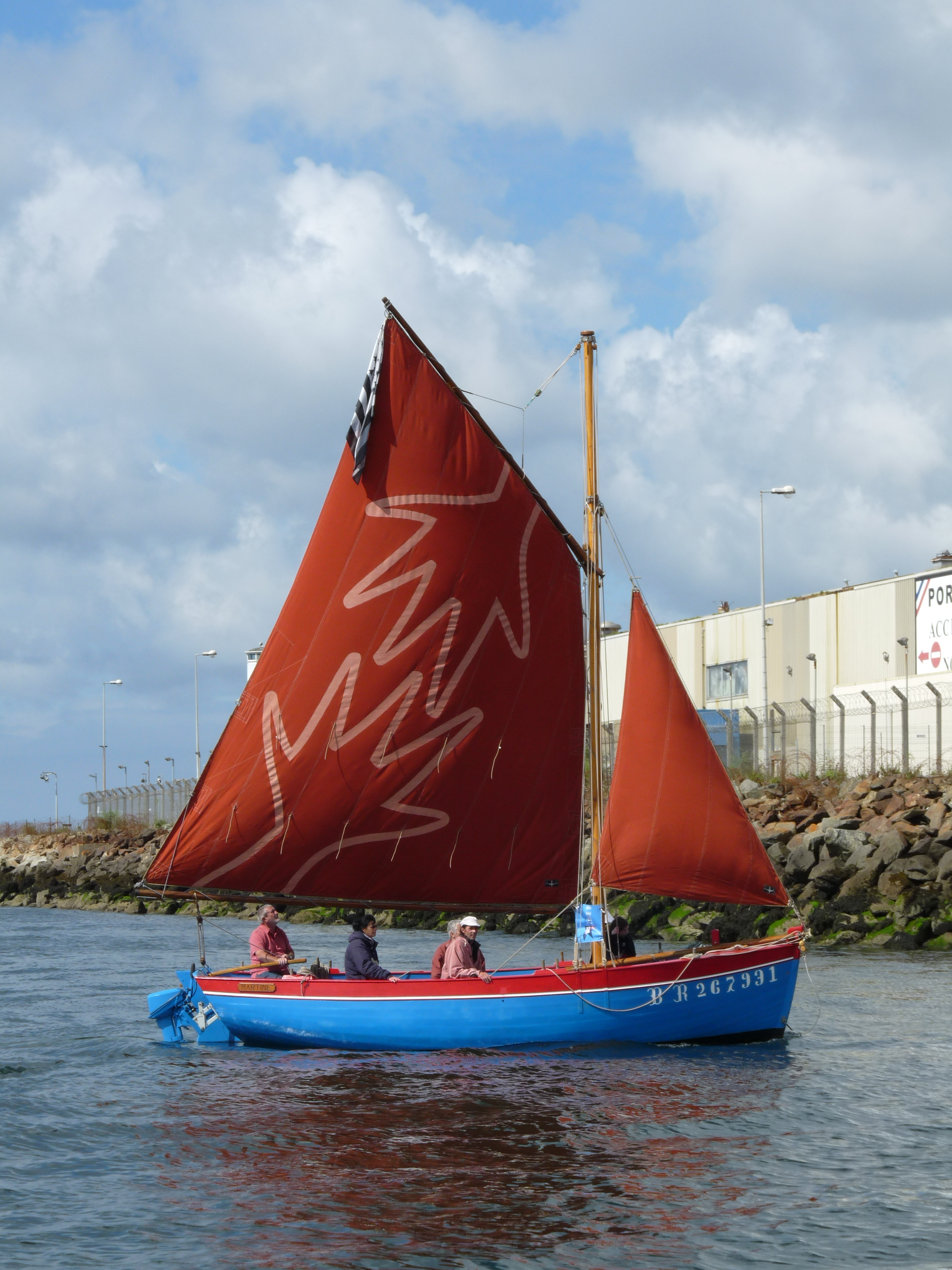 Les Tonnerres de Brest 2012 : Martine sous voile en sortie de Penfeld